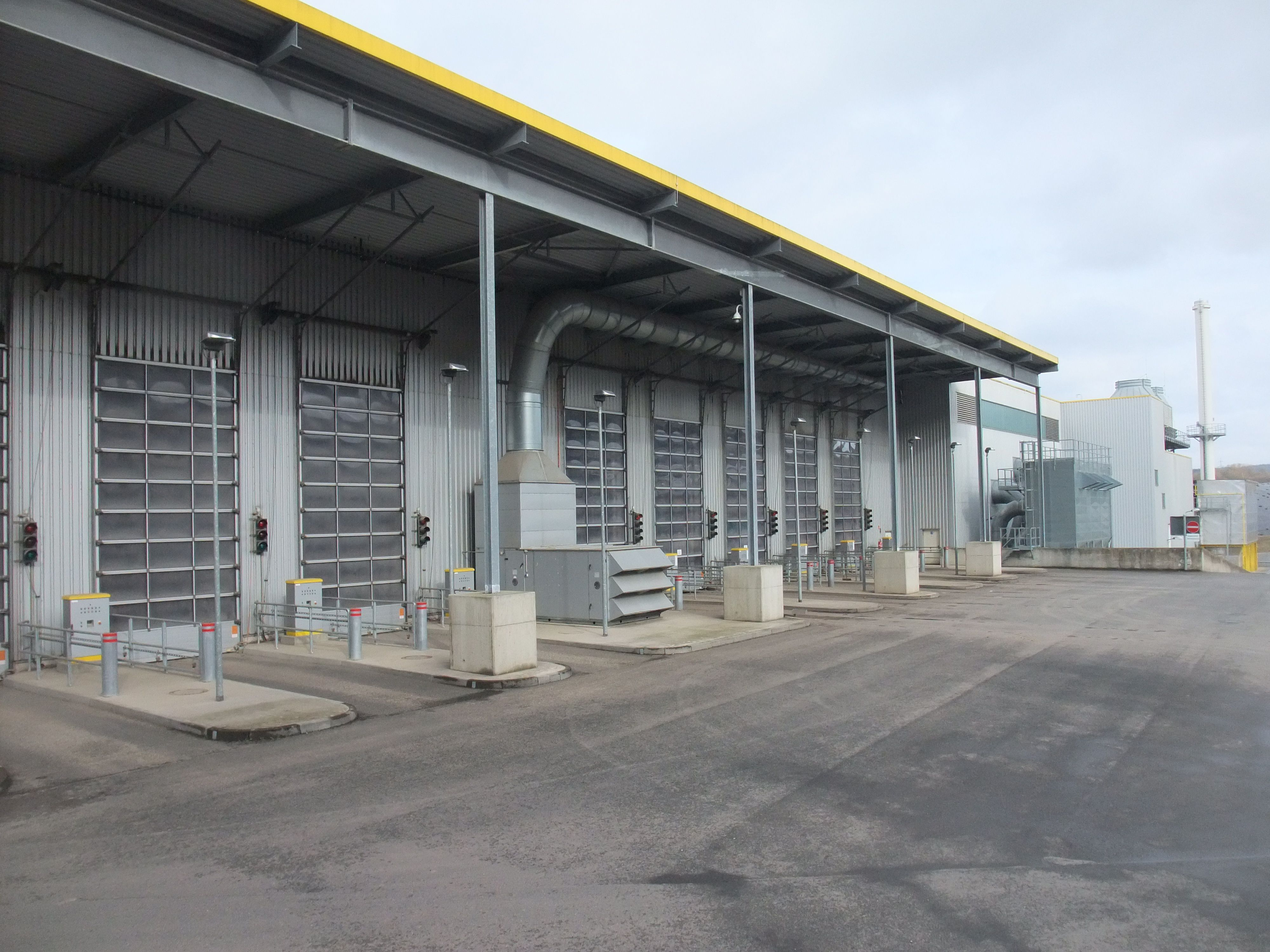 MBT RegEnt Anlieferungsbereich